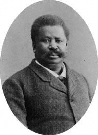 Pablo Fanque (eigentlich William Darby. * 1796; † 1871), erster schwarzer Zirkusdirektor in Großbritannien